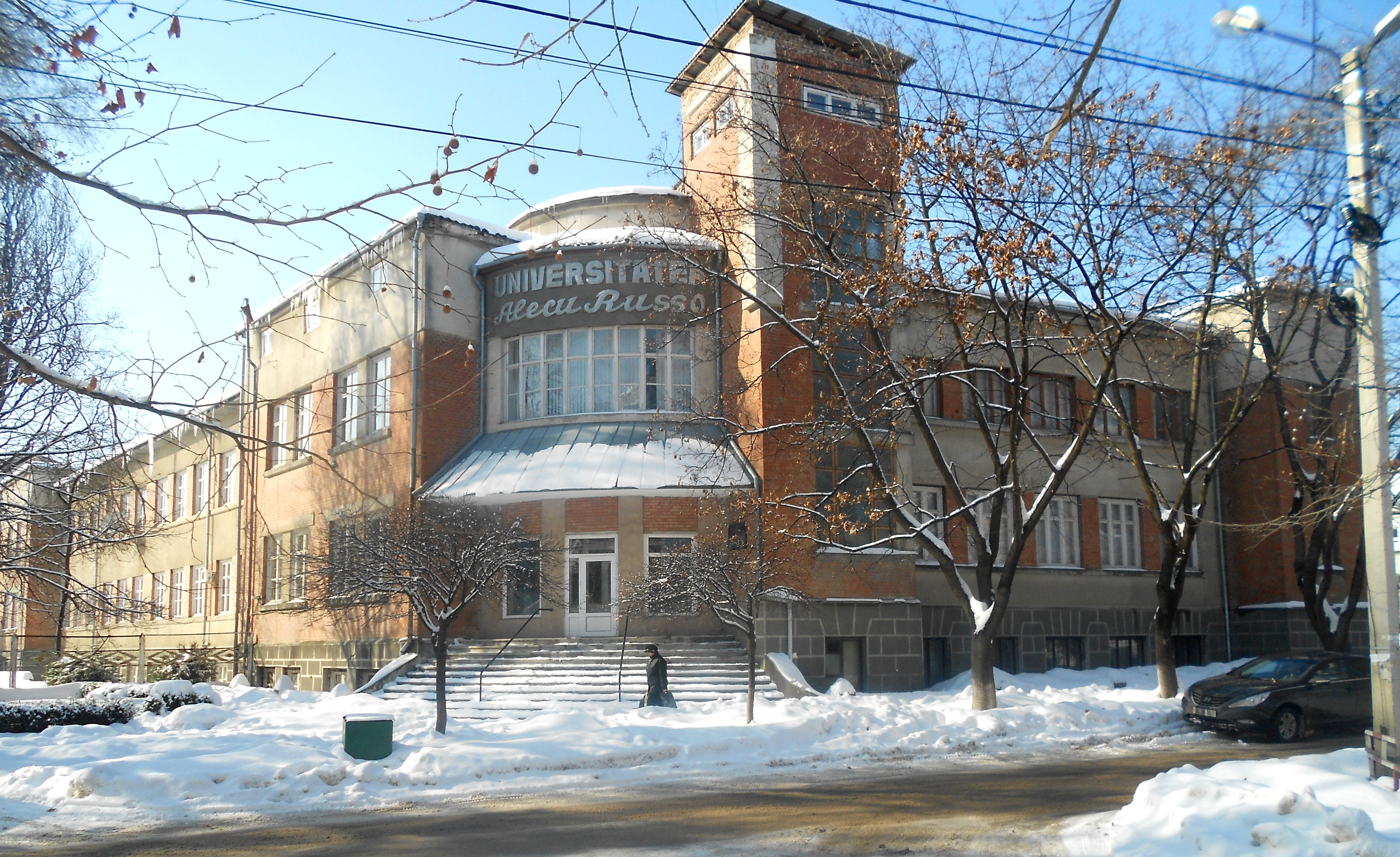 Rectoratul Universității de Stat Alecu Russo din Bălți